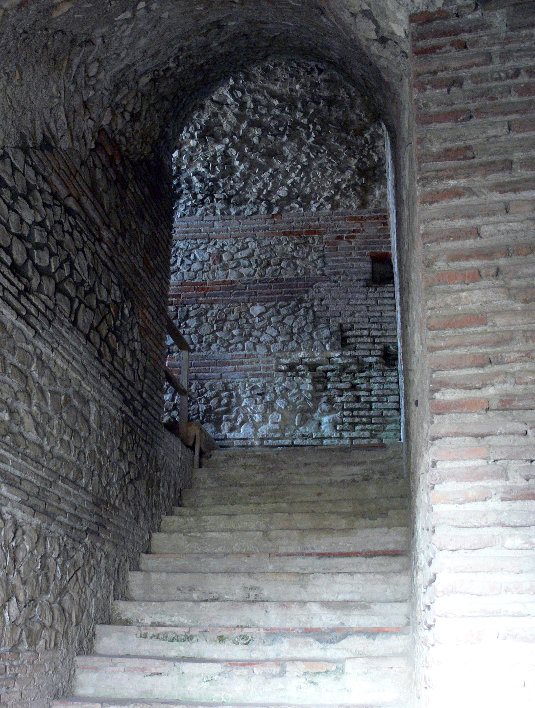 Aufgang aus dem Untergeschoss in die Arena des Amphitheater von Durrës